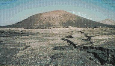 Paysage volcanique de Lanzarote.